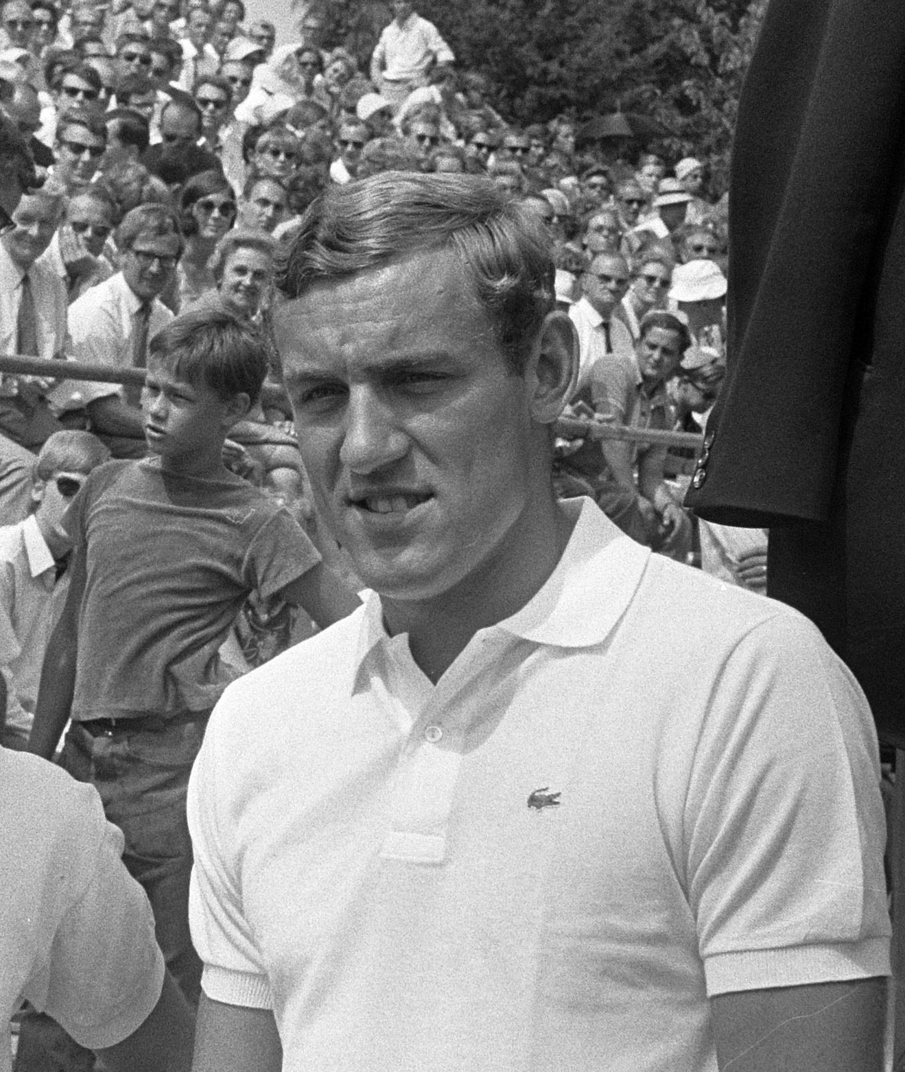 Open Nederlandse Tenniskampioenschappen 1969 in Hilversum Beschrijving: Vladimir Zednik (Tsjecho-Slowakije)